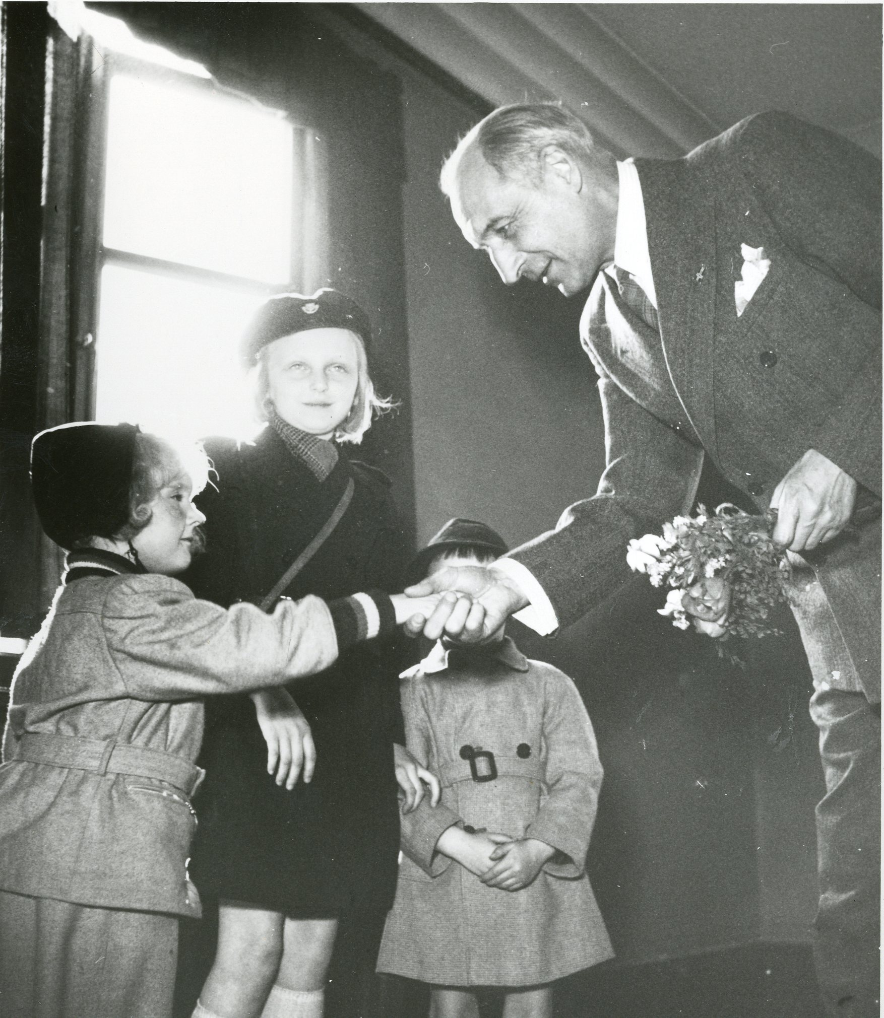 Minister Esmarch mottar noen svenske småpiker som overbringer blomster og gratulasjoner i anledning Norges befrielse. Stockholm 7.5.45. RA/PA-1209/Uc/72/4/S 5760